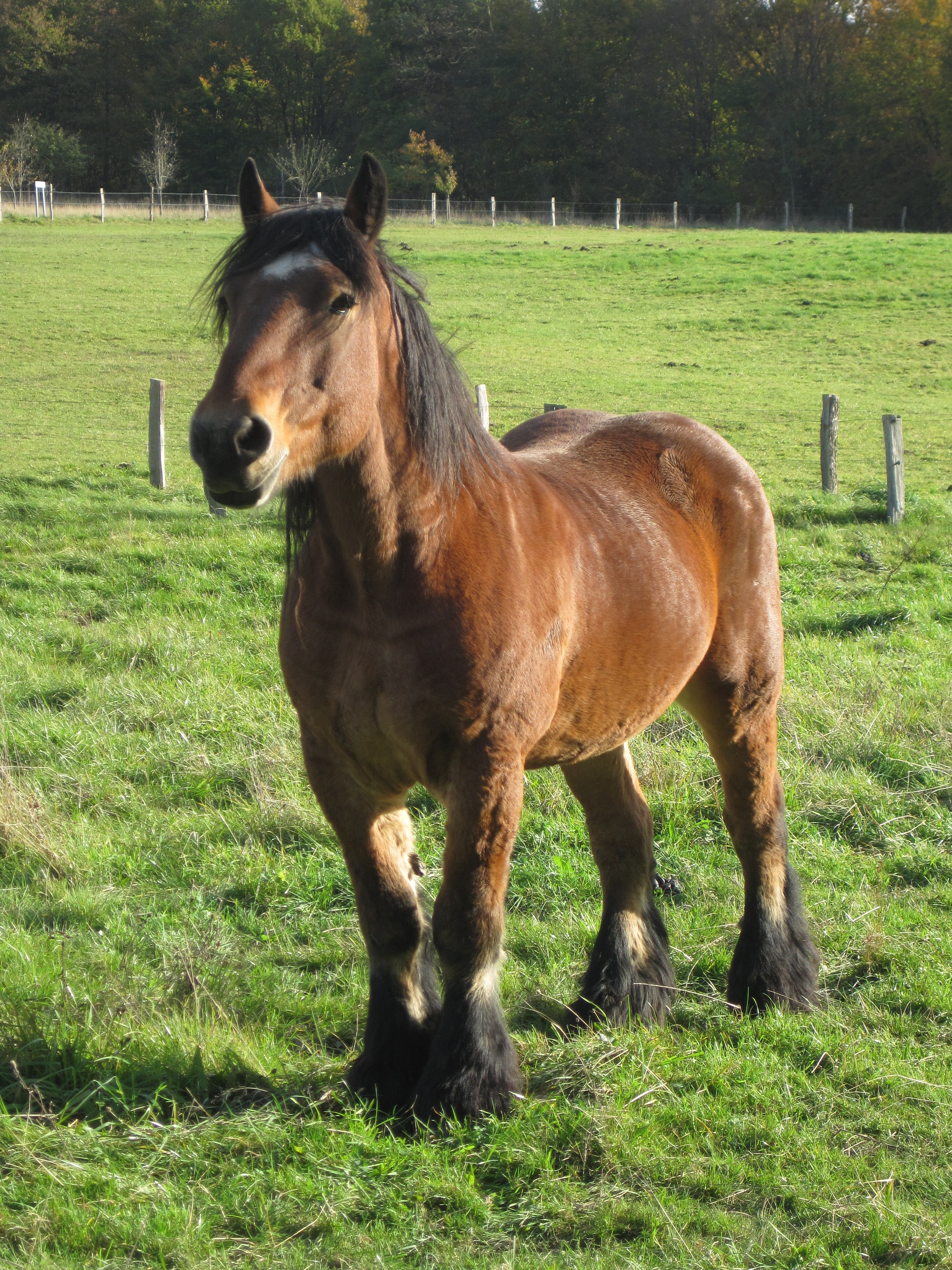 Étalon ardennais du domaine du Fourneau Saint-Michel à Saint-Hubert (Belgique).